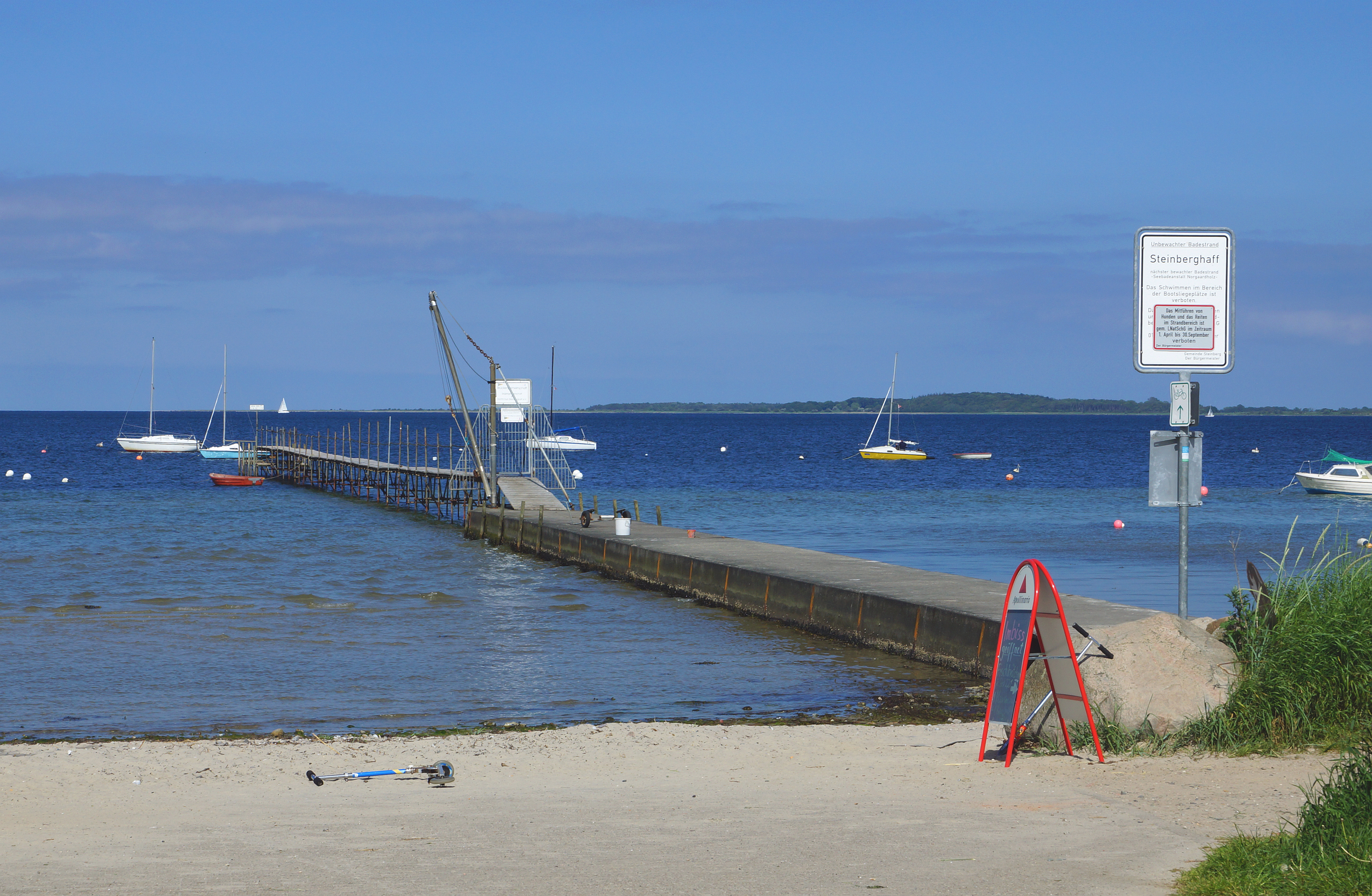 Steinberghaff mit Bootssteg und Bojenfeld sowie Strand an der Geltinger Bucht - Steinberg Ostsee Foto 2013 Wolfgang Pehlemann DSC04099